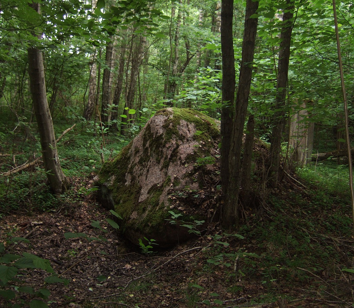 Antatiškių, arba Šiaučiuko, akmuo